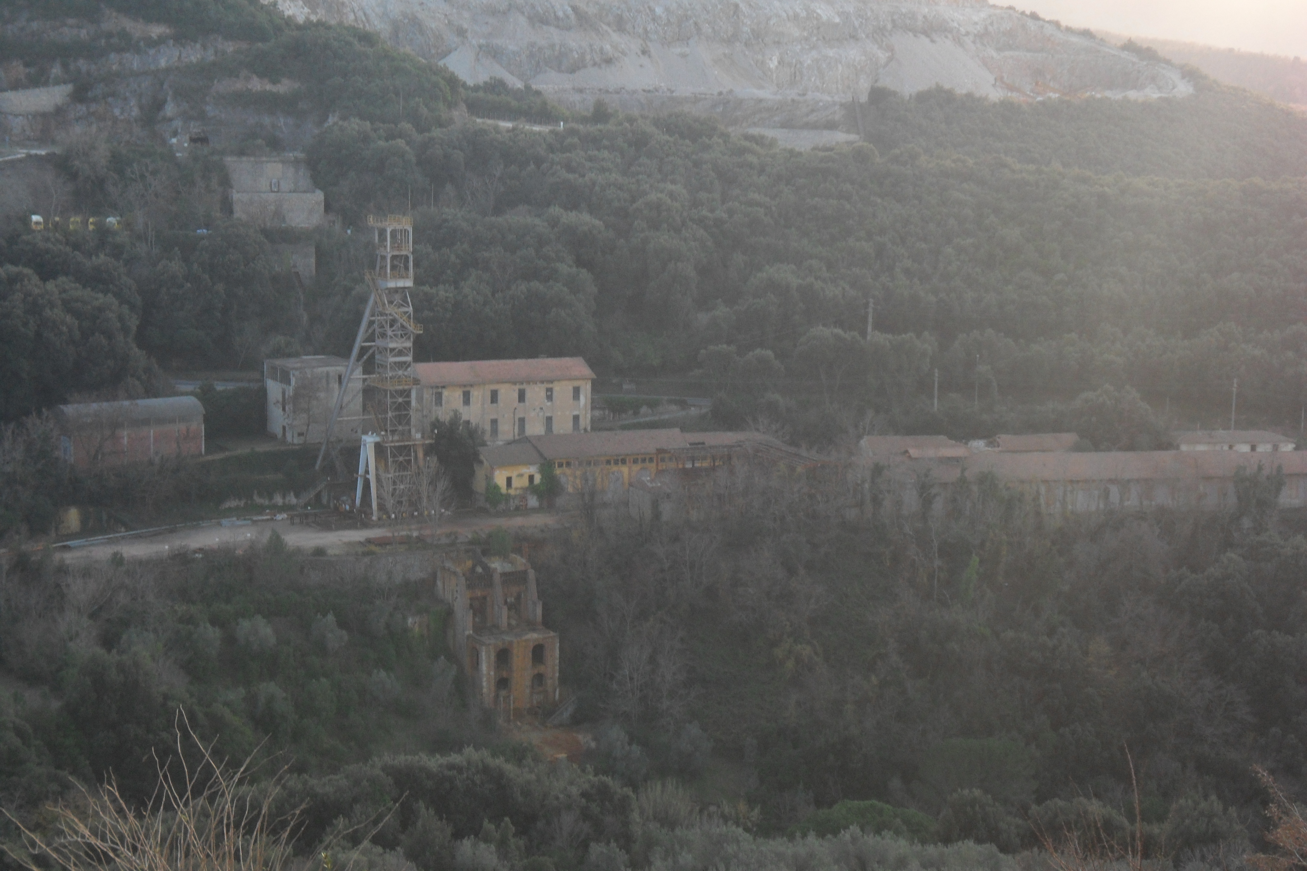 Pozzo roma